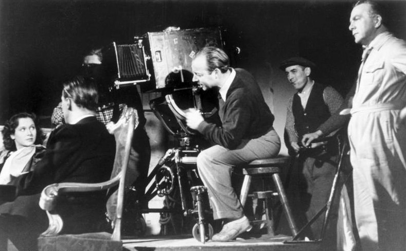 Deutscher Schauspieler in charakteristischen Rollen Spielleiter Rühmann hat den Platz des Kameramannes eingenommen und prüft noch einmal die Einstellung